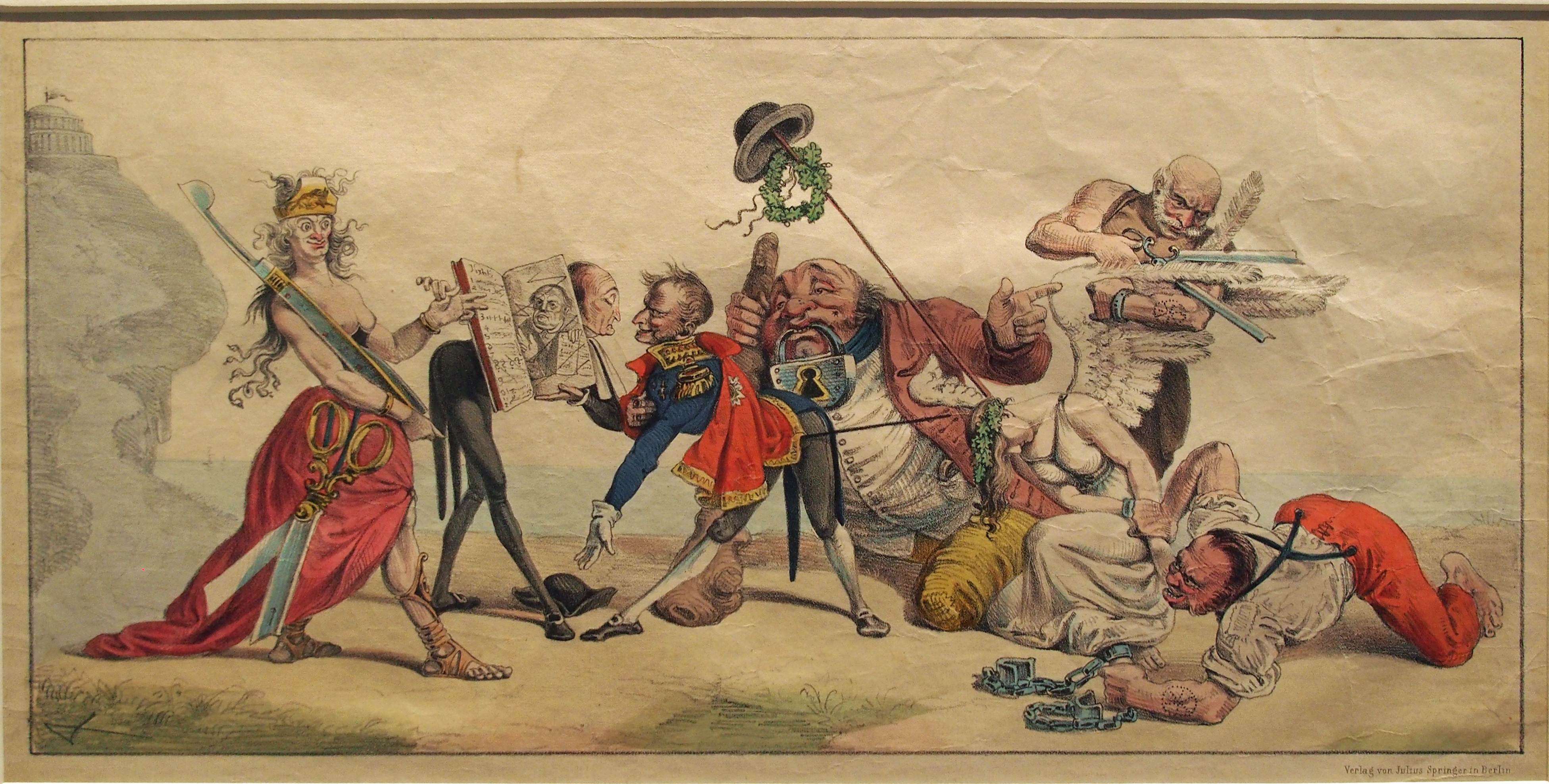 Der deutsche Michel in der Gewalt der Zensur. Ursprünglicher Titel: Der Eintritt der Censur in Deutschland